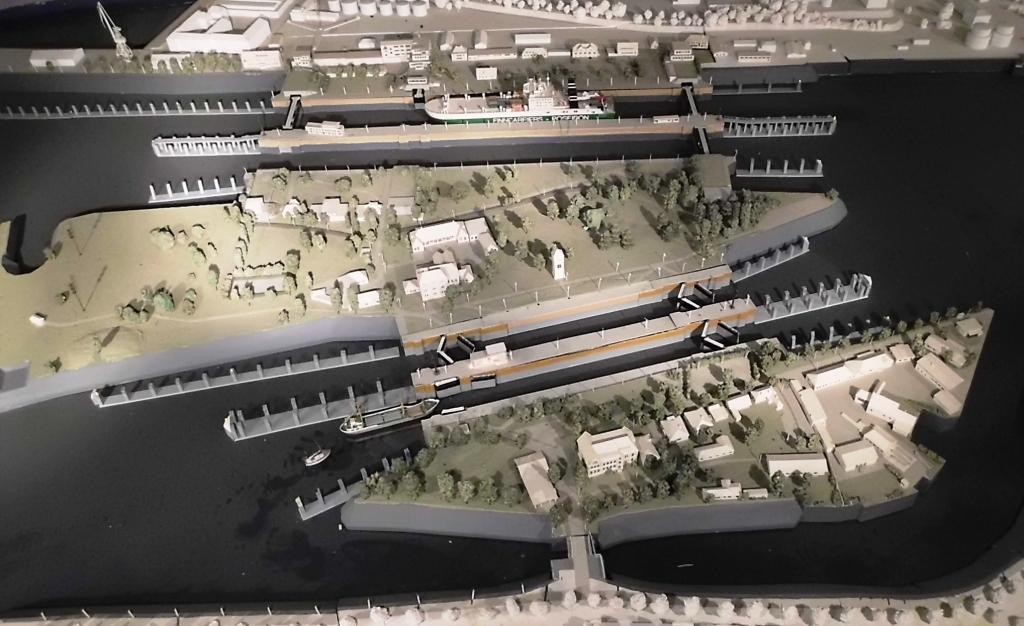 Modell der Schleuse des Nord-Ostsee-Kanals in Kiel-Holtenau